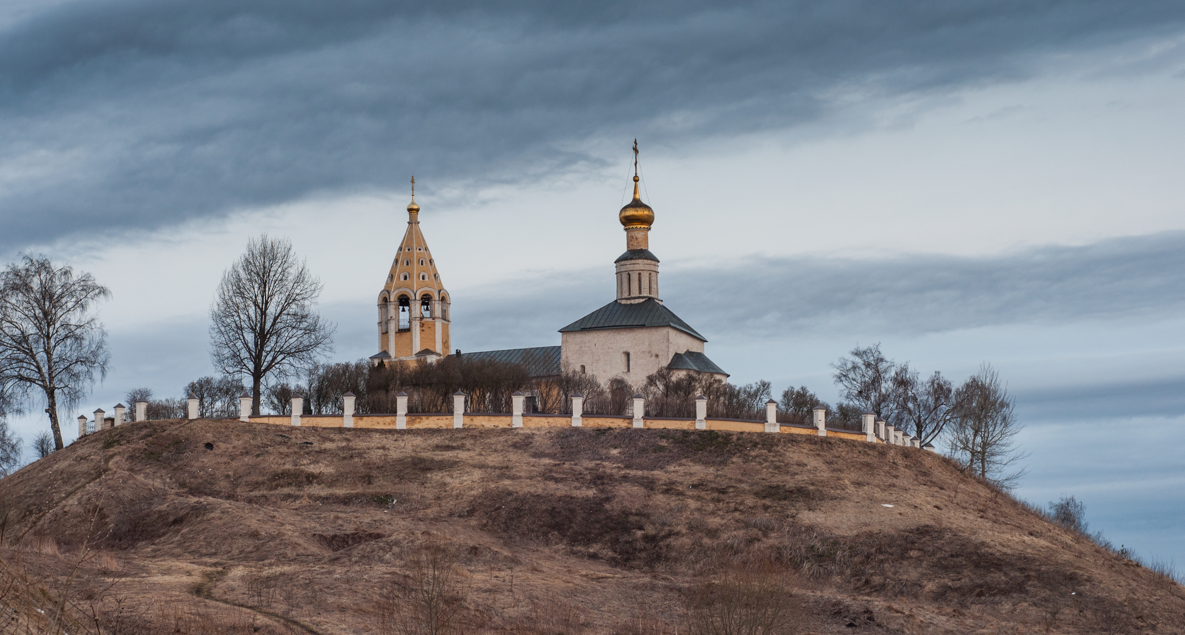 Церковь Рождества Богородицы: Городня, Конаковский район, Тверская область